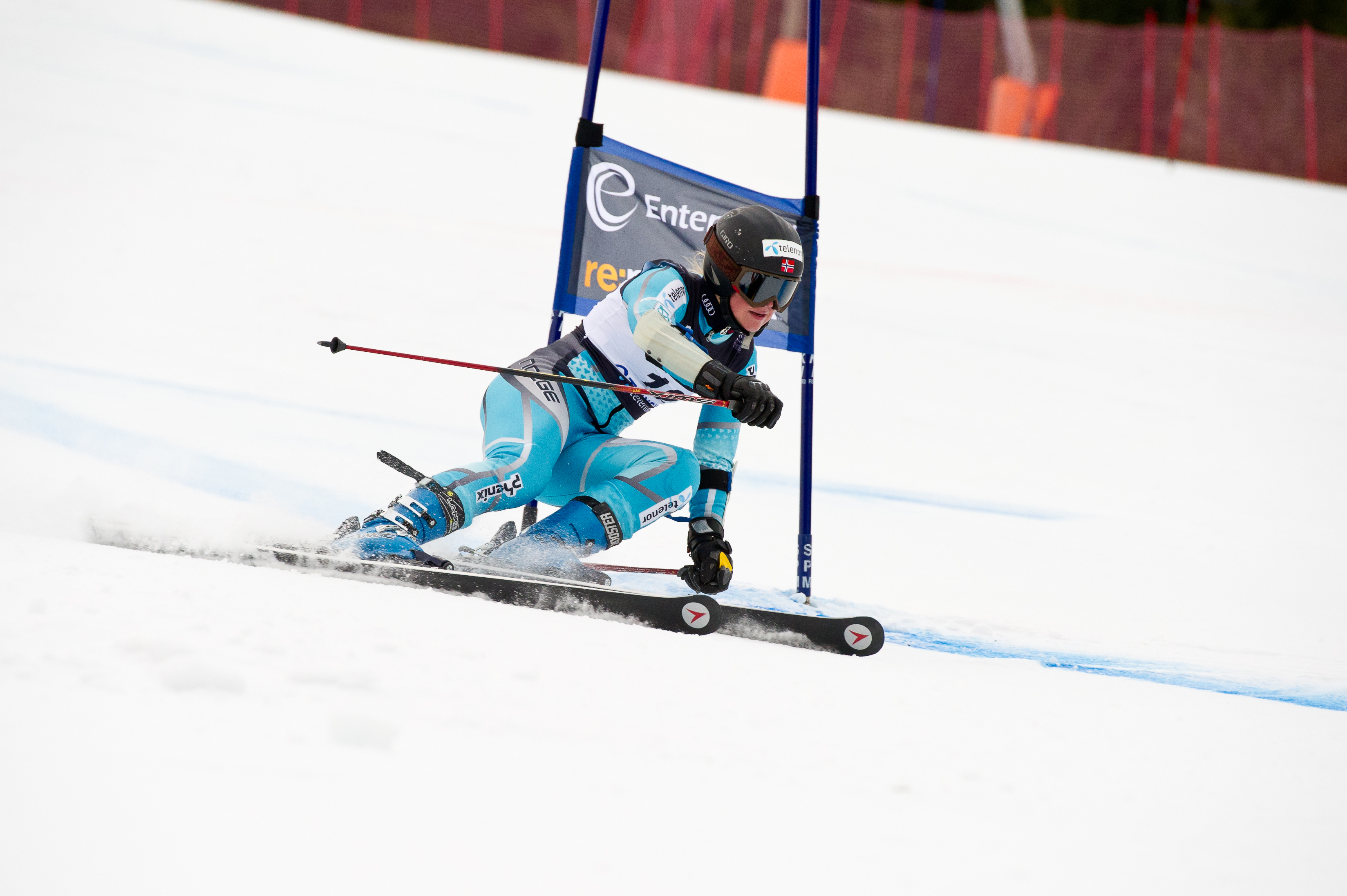 Nr. 7 Annie Winquist i NM i storslalåm for damer i Trysil 26. mars 2011. Foto: Ola Matsson